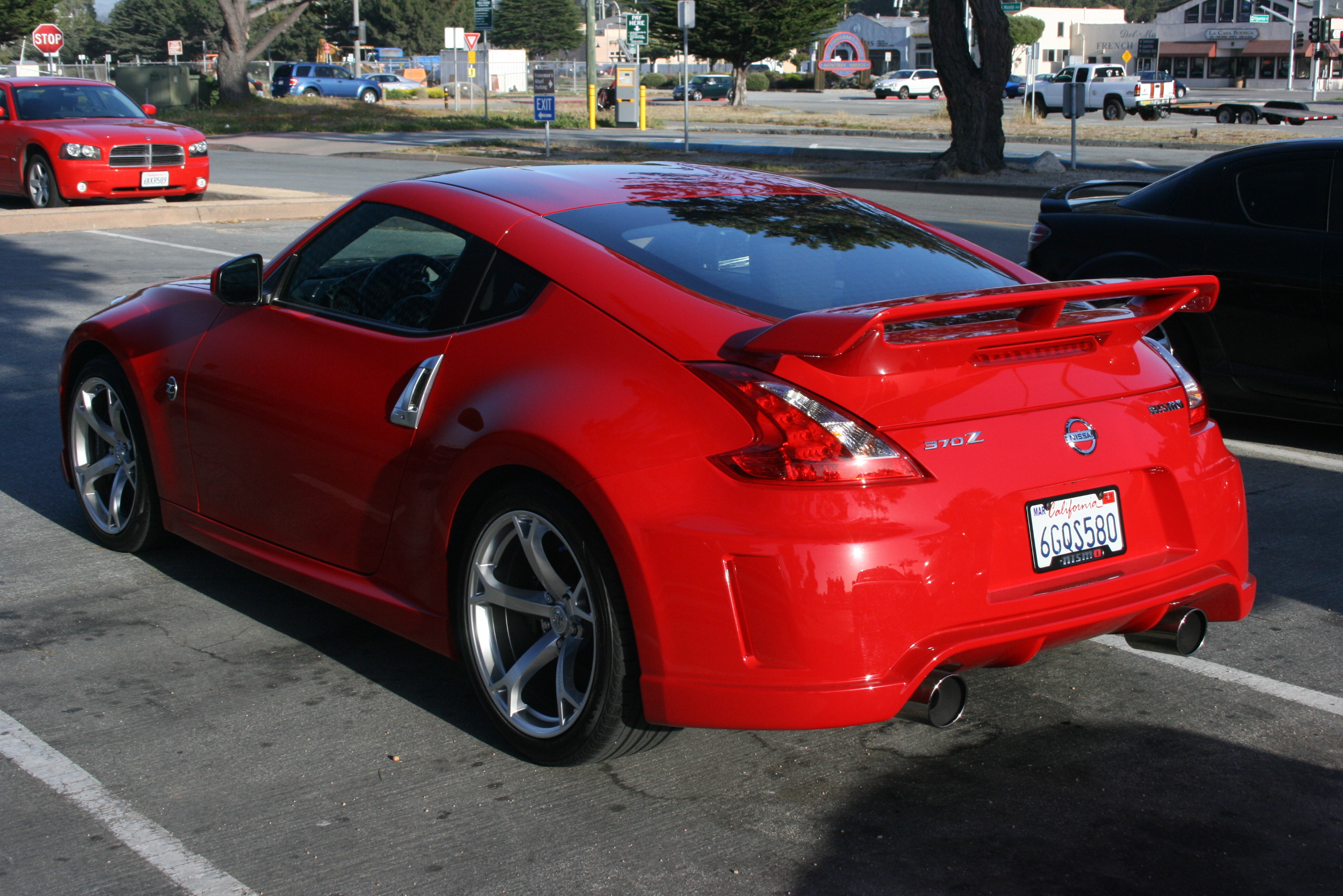 Nissan 370Z Nismo, Monterey